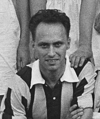 Karel Weijand.